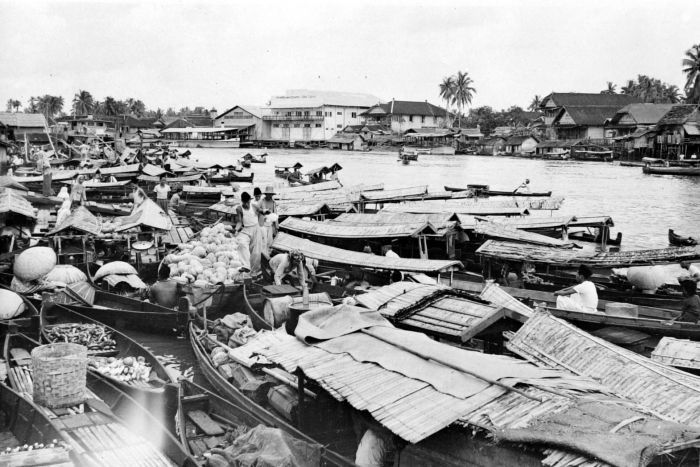 Repronegatief. Bandjermasin, gezicht vanaf de pasar op 'Djukungs'